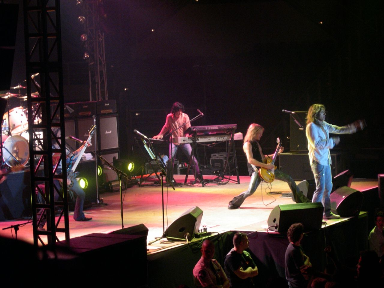 Whitesnake in Kalamaria, Kentriki Makedonia.